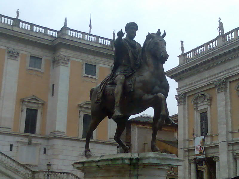 Estatua ecuestre de Marco Aurelio situada en la Colina Capitolina